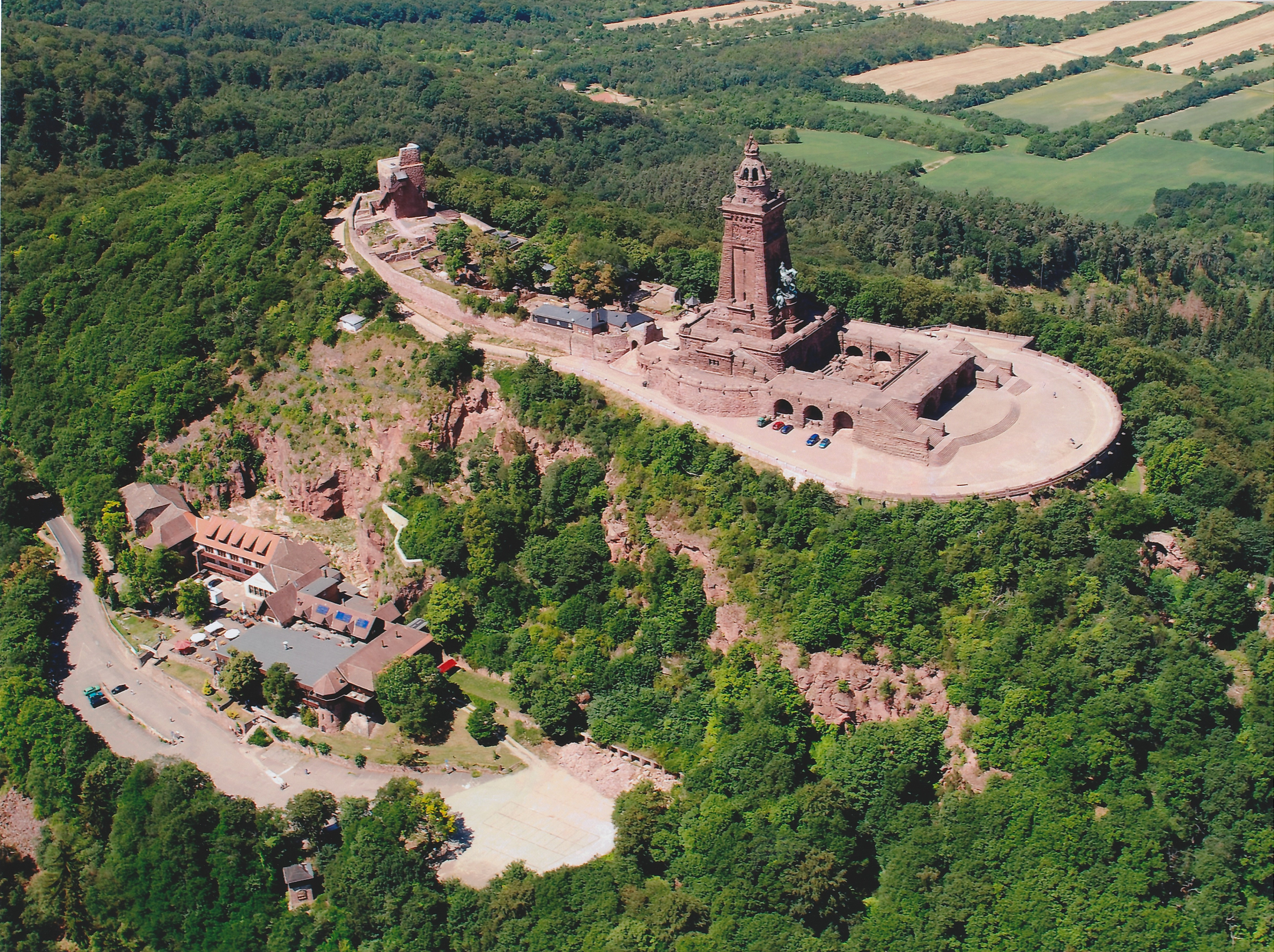 Luftaufnahme von Burghof und Denkmal